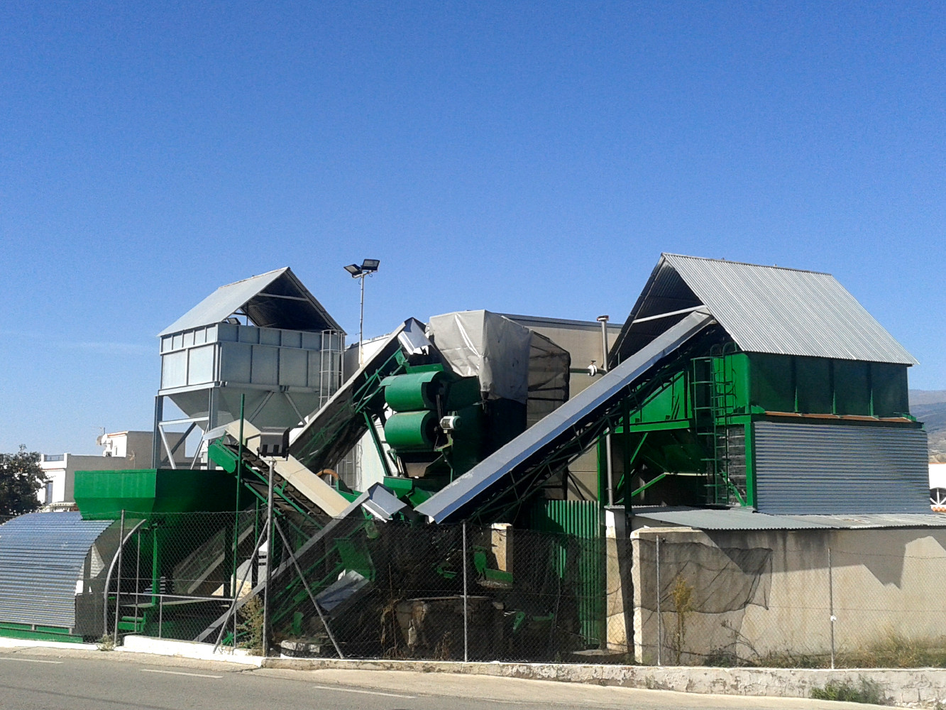 Almazara en Alcolea, Almería.